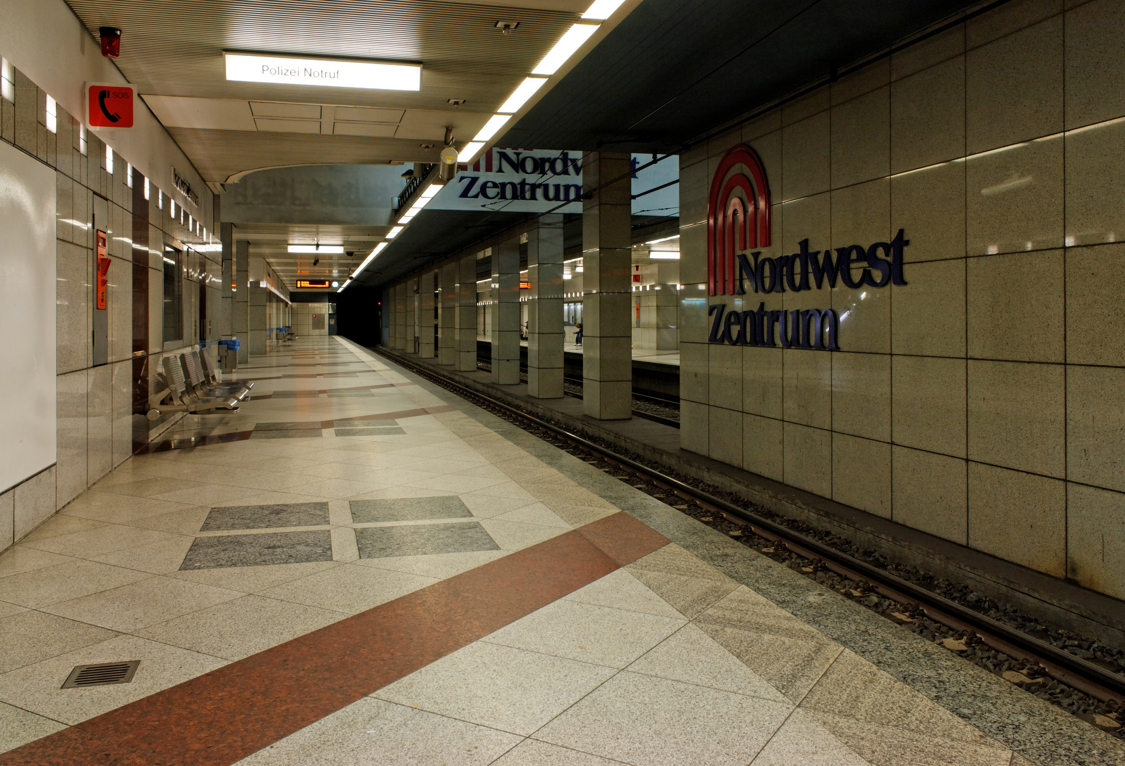 U-Bahn-Station Nordwestzentrum der U-Bahn Frankfurt